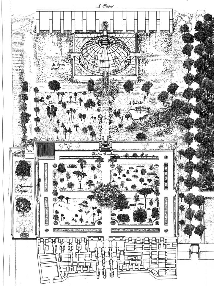 Grande Serra Desertica Orto Botanico di Portici. Progetto dell'architetto Donatella Mazzoleni